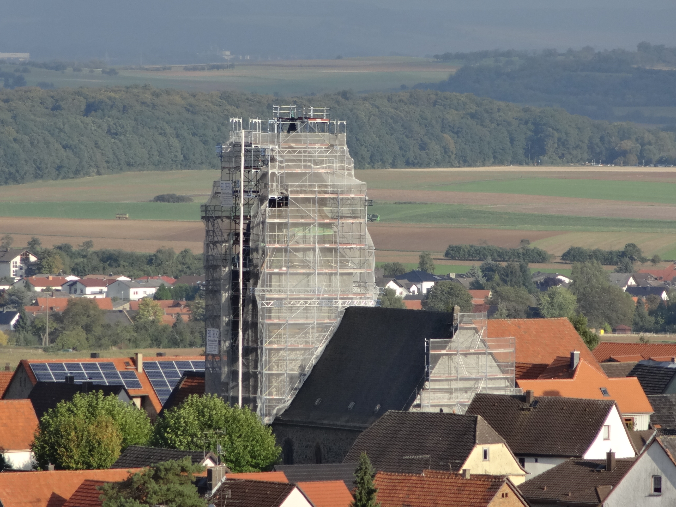 Taunusstraße 37